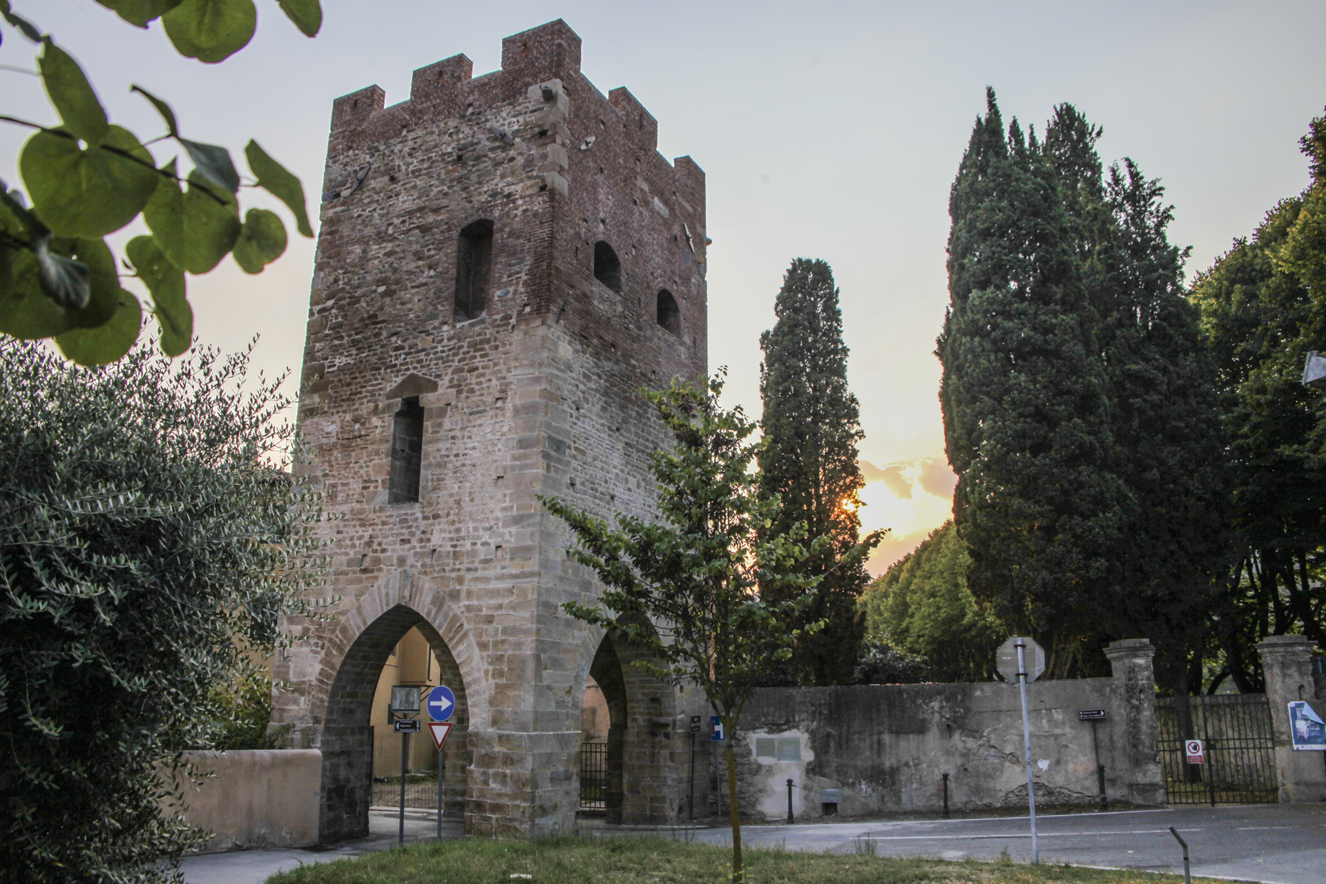 Torre delle quattro porte This is a photo of a monument which is part of cultural heritage of Italy.